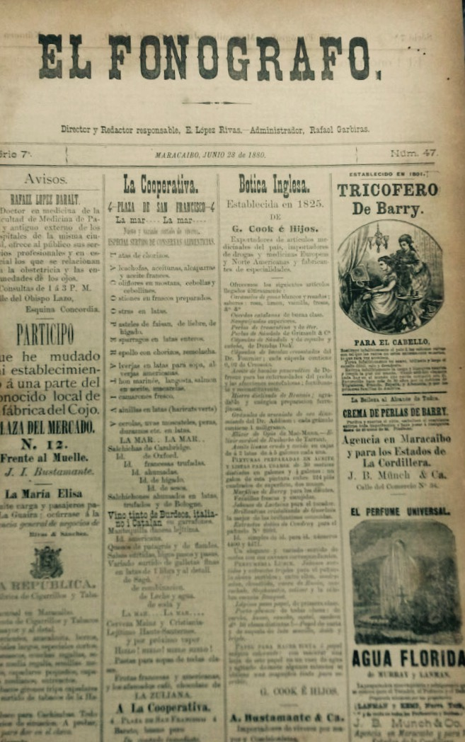 Página del diario "El Fonógrafo" en 1880, con los primeros avisos ilustrados que iniciaron en Venezuela el arte de la Publicidad.